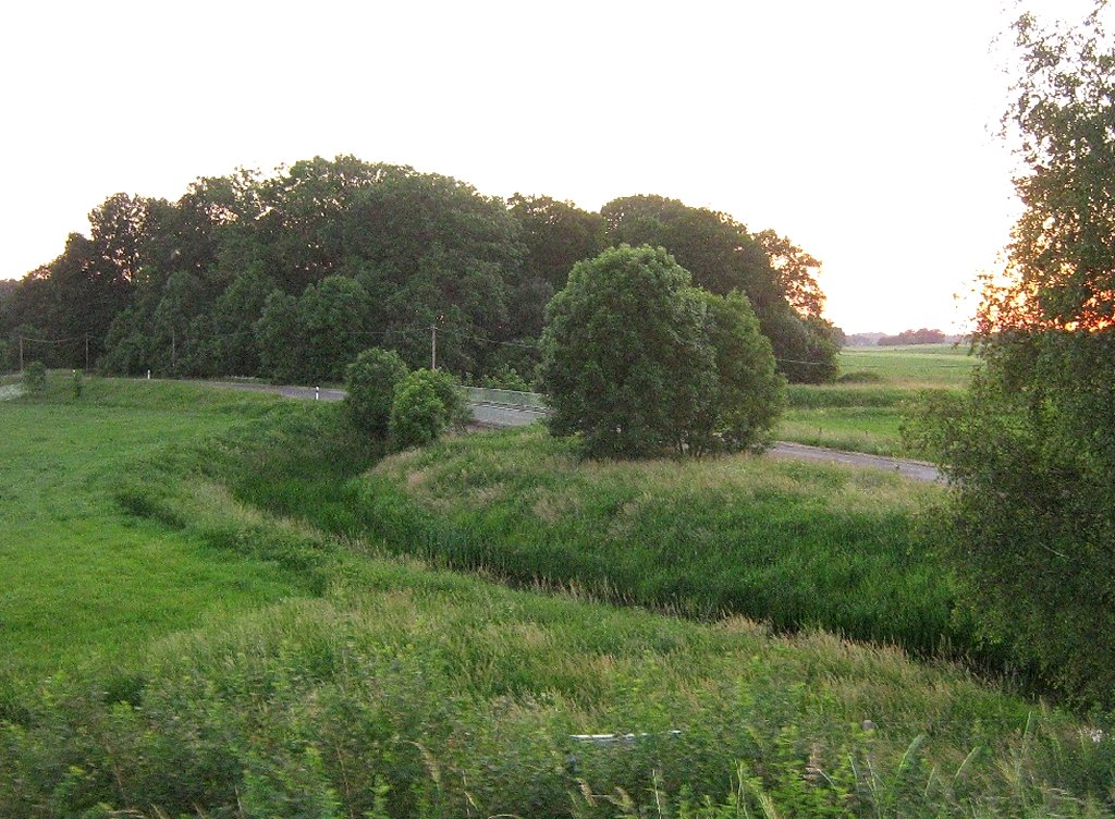 die Elde bei Zepkow in Mecklenburg-Vorpommern, Germany